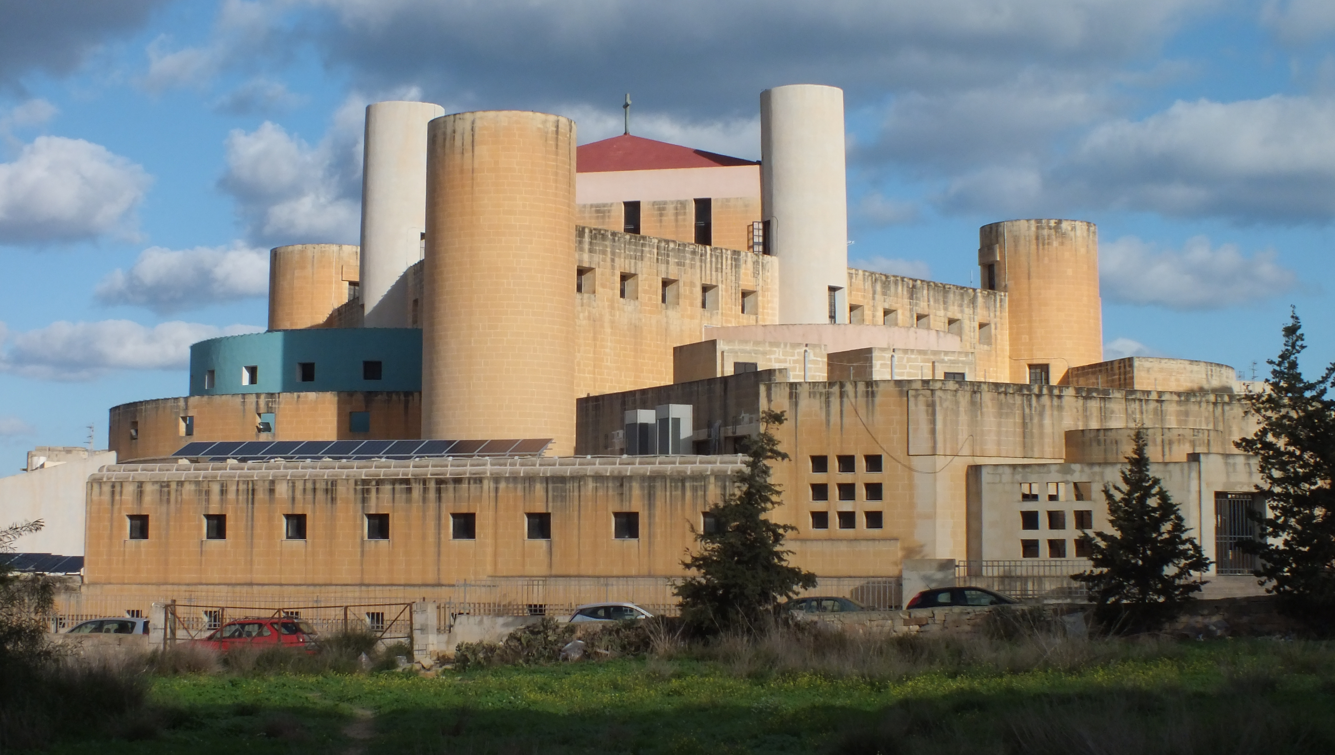 Malta, St. Franziskus-Kirche (Church of St Francis of Assisi), Ortsteil Qawra von St Pauls bay